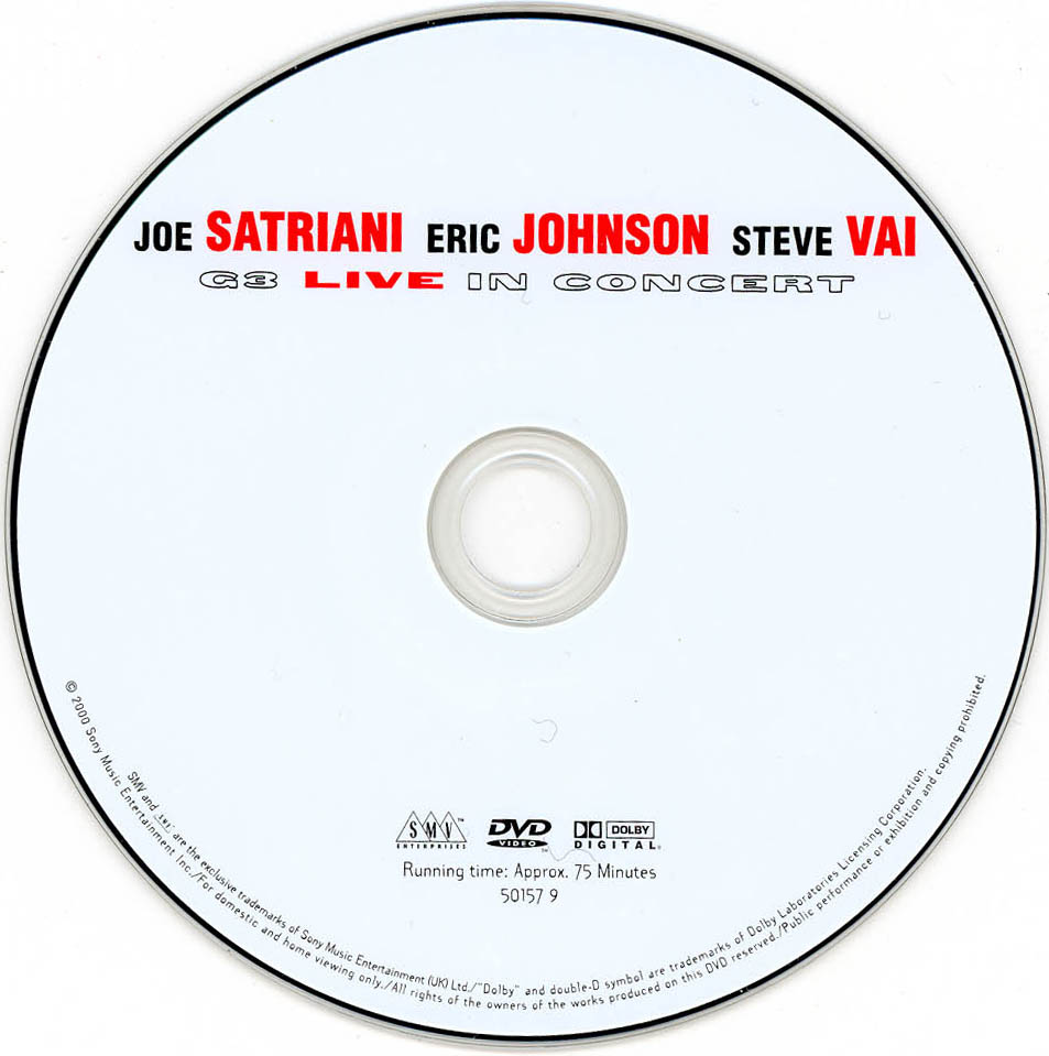 DESCRIPCIÓN:G3-LIVE IN CONCERT-GRABADO EN NORTHROP,EN EL AUDITORIO DE MINNEAPOLIS USA.ESTE FUE EL PRIMER G3 CON LA PARTICION DE JOE SATRIANI-ERIC JOHNSON-STEVE VAI. FUENTE:ARCHIVO PERSONAL.FOTOGRAFÍA DVD ORIGINAL. FECHA: 02 DE NOVIEMBRE 1996 AUTOR FICHERO :JUAN CARLOS SEPÚLVEDA G.(MAIL: )